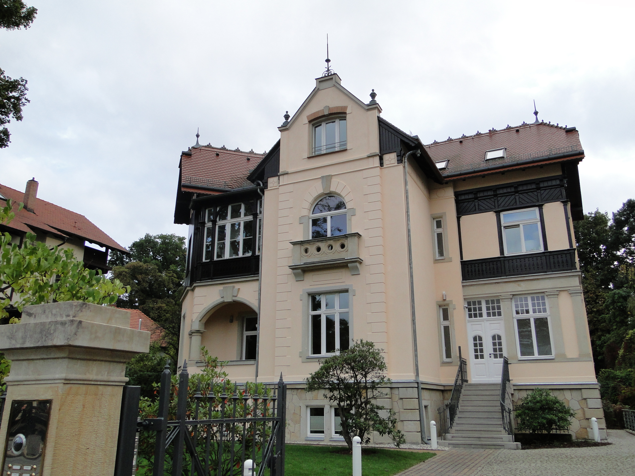 Loschwitzer Straße 38, Dresden